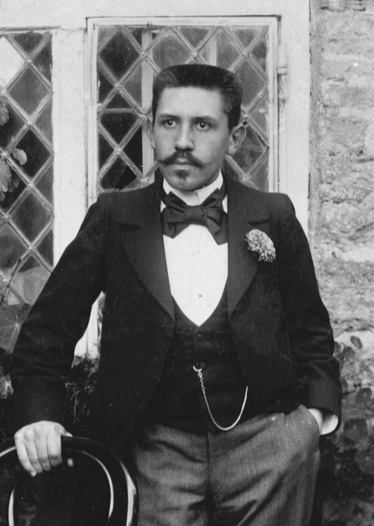 Paul Langevin, physicien français, Cambridge, Grande-Bretagne, 1897.